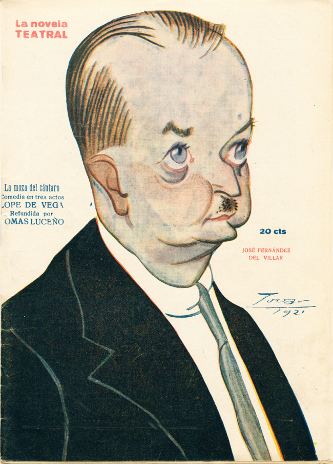 Caricatura de José Fernández del Villar.